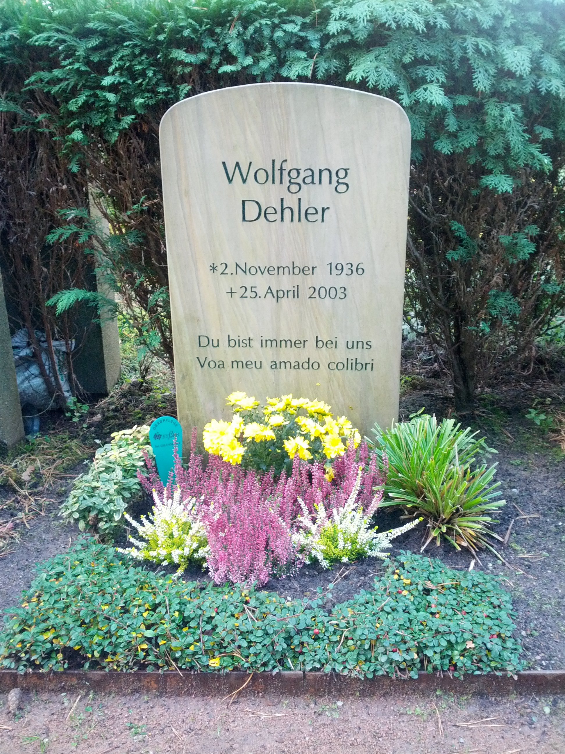 Grabdenkmal für Wolfgang Dehler auf dem Urnenhain Tolkewitz